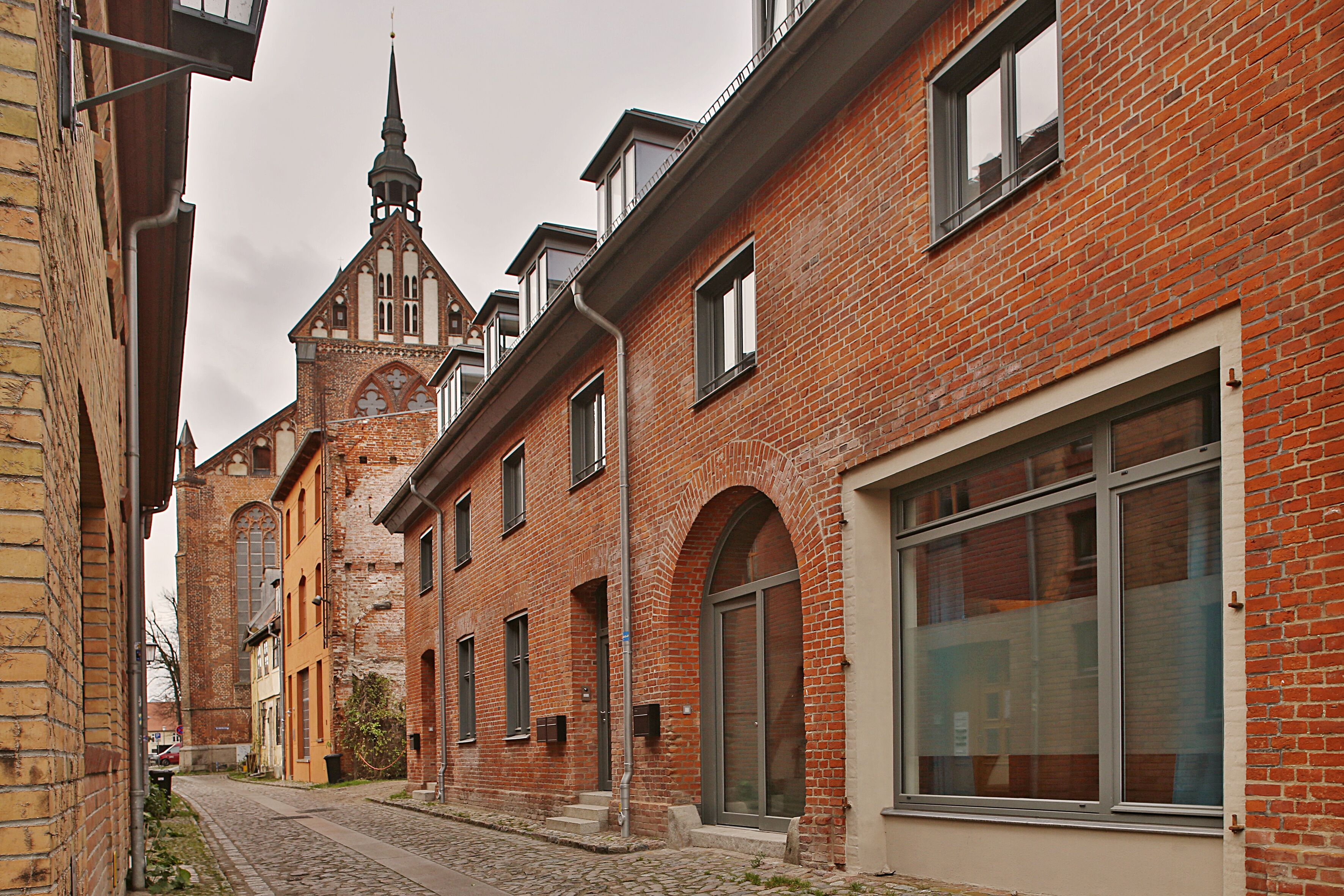 Gebäude Papenstraße 25 nach der Sanierung 2013